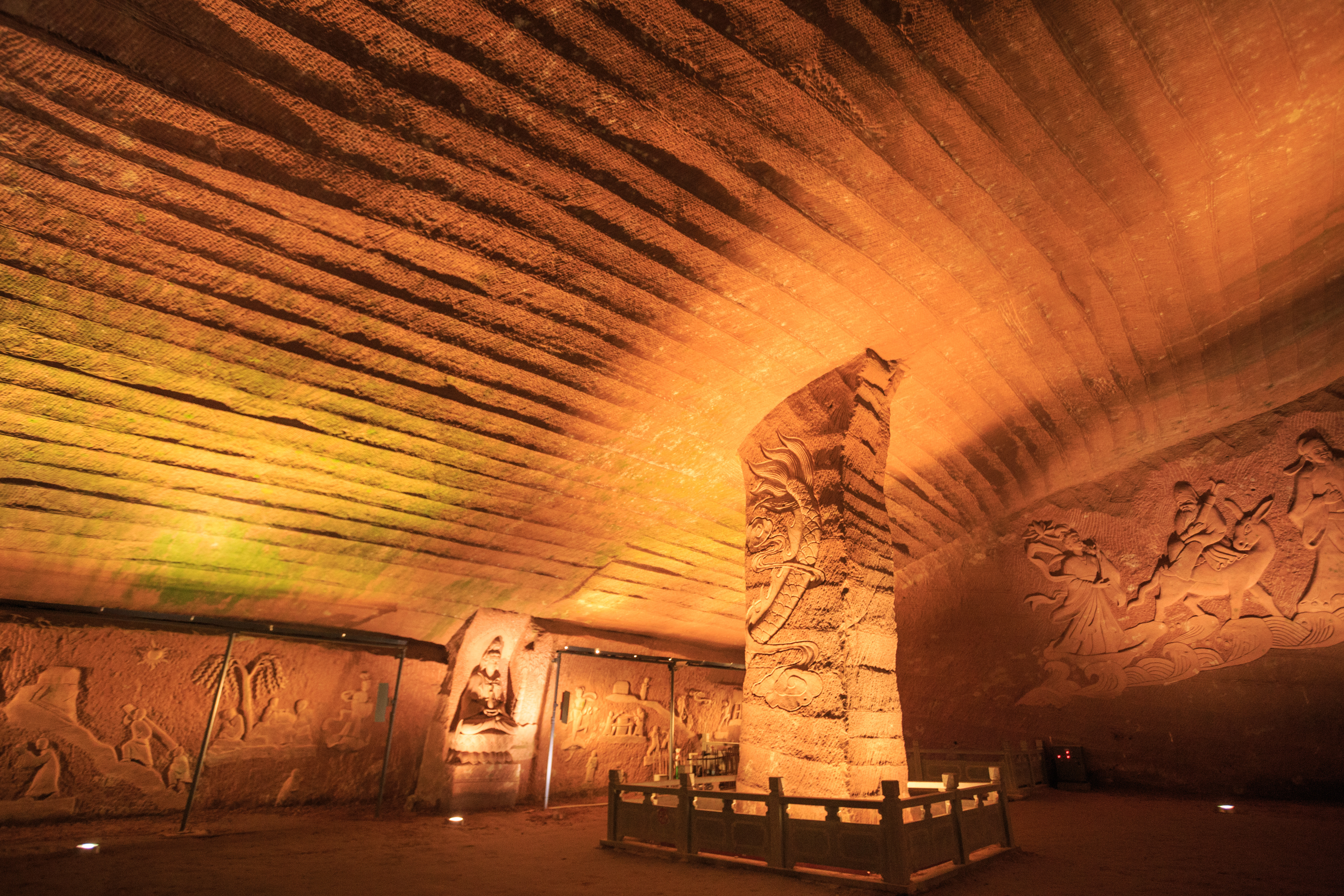 小南海石室 5号洞